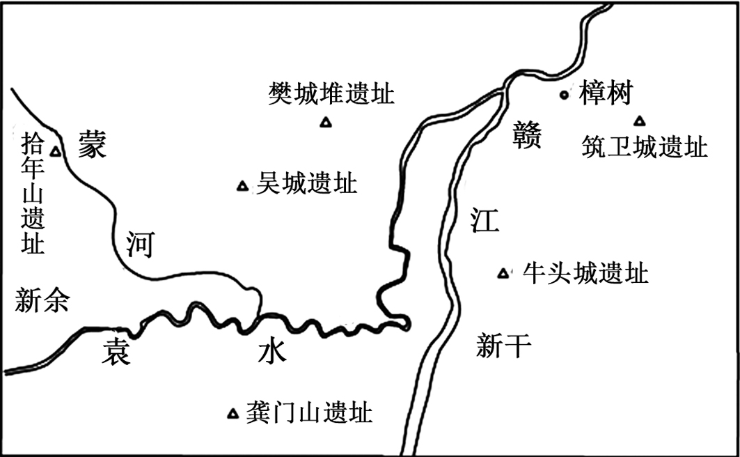 江西樊城堆